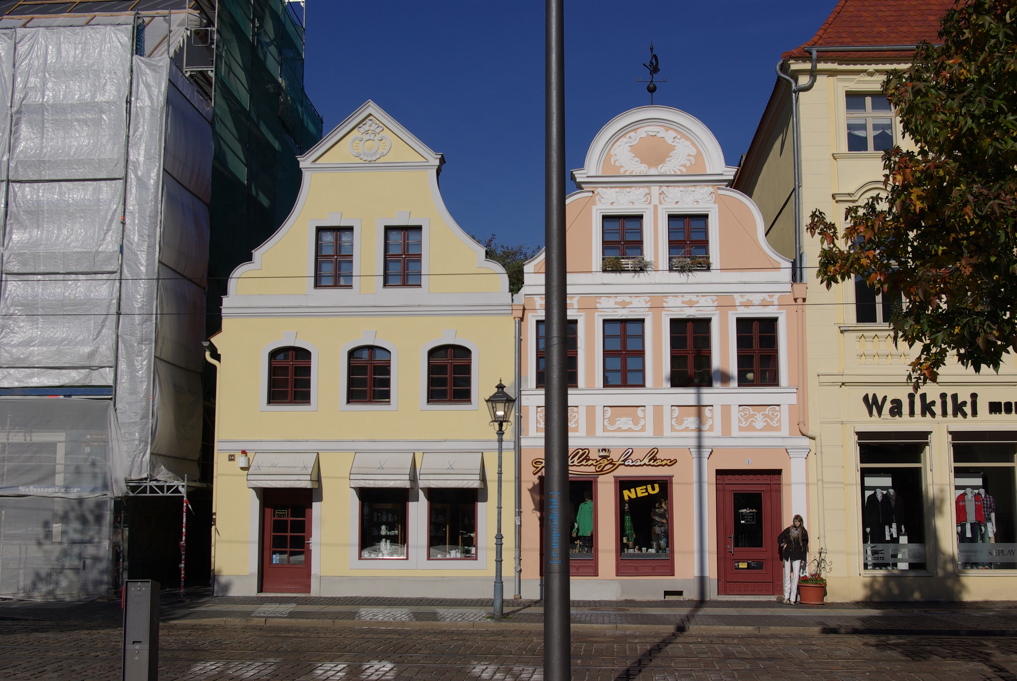 Cottbus in Brandenburg. Das Doppelhaus Altmarkt 14 steht unter Denkmalschutz. Das Ersatzhaus ist 1983 bis 1985 für das baufällige Vorgängerhaus errichtet worden.